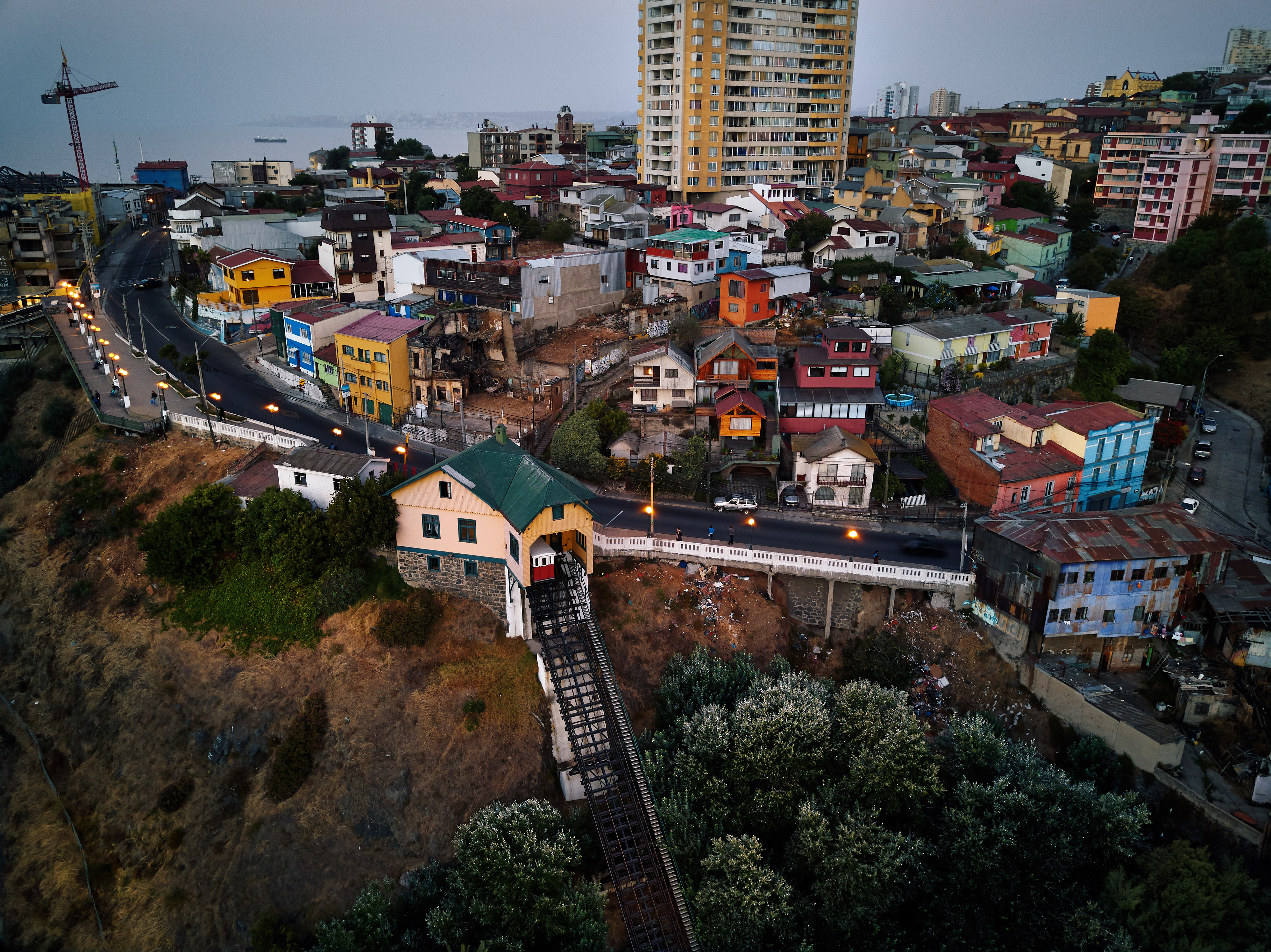 Cerro Barón